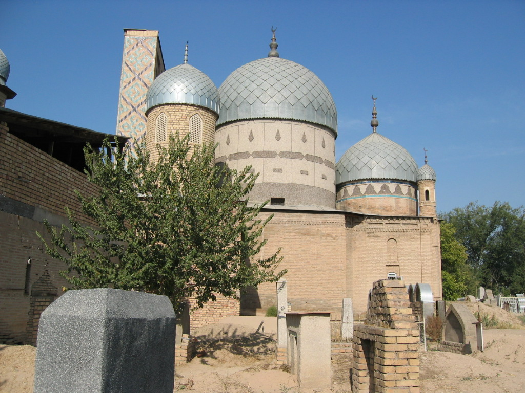 Zangi Ota mausoleum near Tashkent